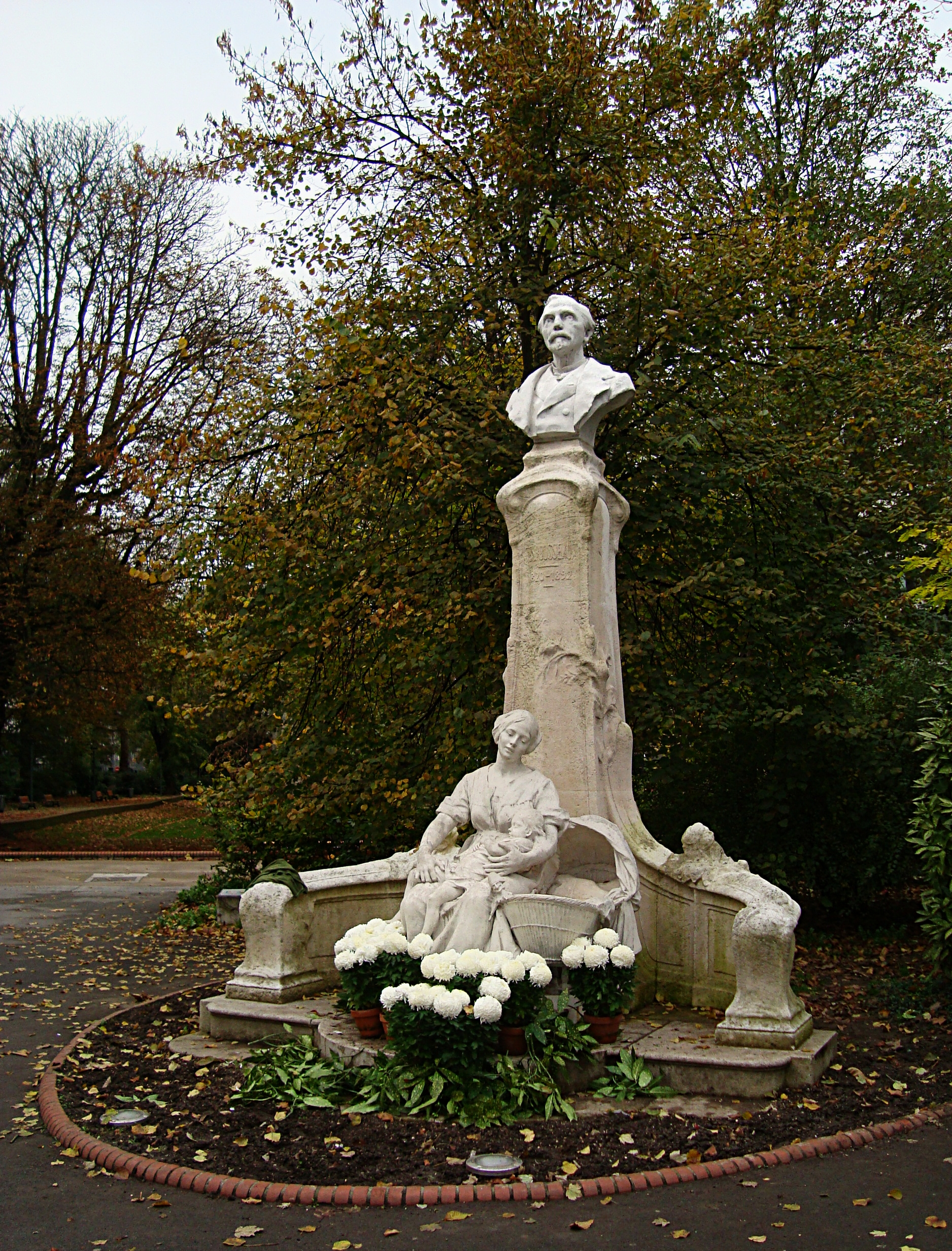 Le monument à Alexandre Desrousseaux, créateur du P'tit quinquin, à l'entrée du square Foch à Lille (Nord). La représentation du P'tit quinquin et de sa mère est une copie, la sculpture originale d'Eugène Dépelchin étant installée dans le hall de l'hôtel de ville.